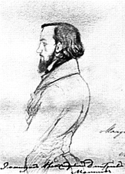 Эммануил Александрович Дмитриев-Мамонов. Автопортрет